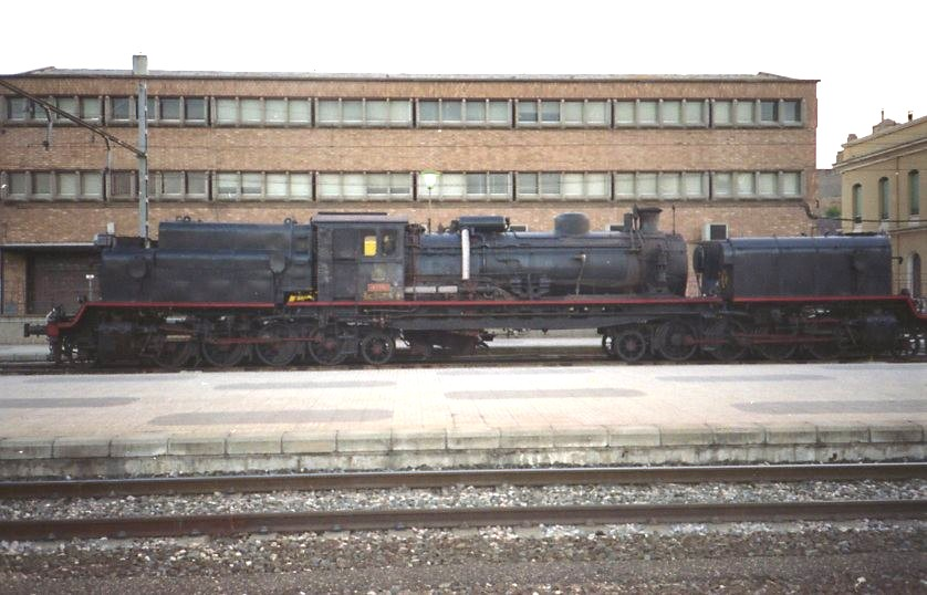 Locomotora de Vapor del Tipo Beyer - Garratt (Dissenyador: Herbet William Garratt).Coneguda popularment per "La Garrafeta". Matricula oficial RENFE: 282F-0421. Restaurada per ARMF (Associació per la Reconstrucció de Material Ferroviari Històric). Fotografiada a la estació de Lleida.